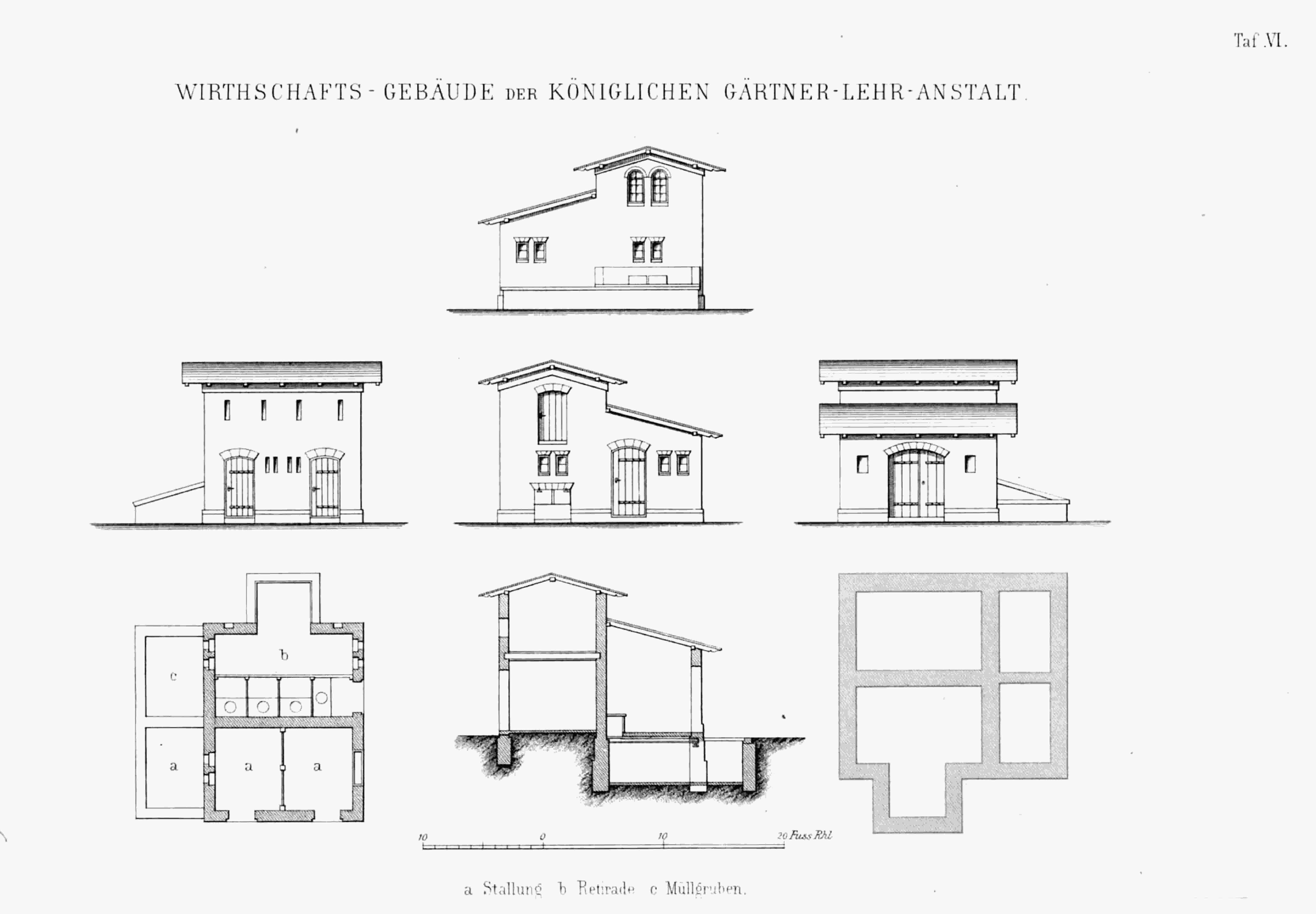 Entwürfe für ein Wirtschaftsgebäude der Gärtnerlehranstalt am Potsdamer Neuen Palais